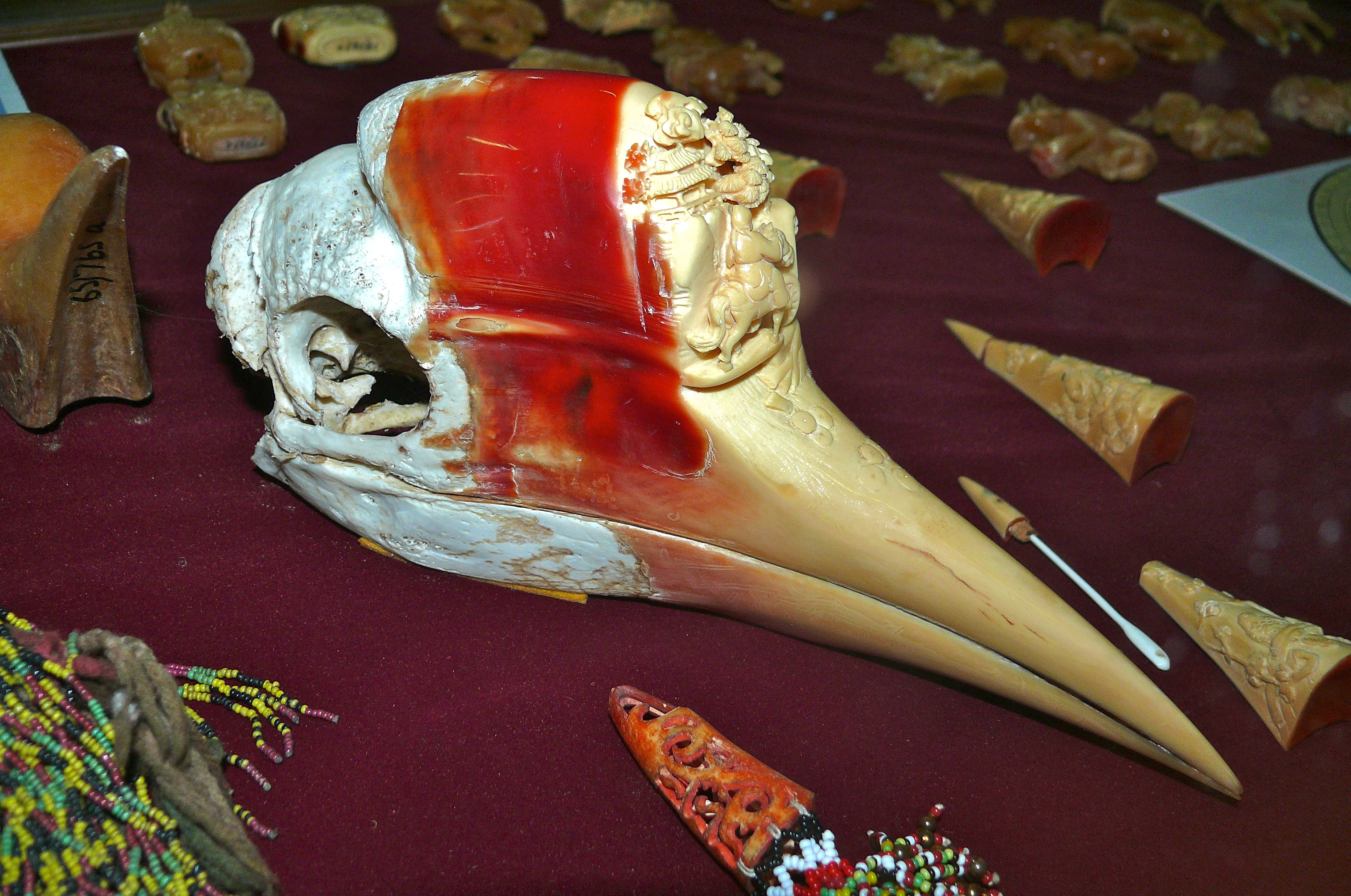 Sarawak Museum, Kuching, Sarawak, MALAYSIA